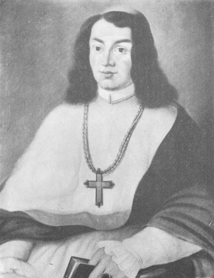 Pál Várdai, Archbishop of Esztergom in the XVI century. Várdai Pál, esztergomi érsek.